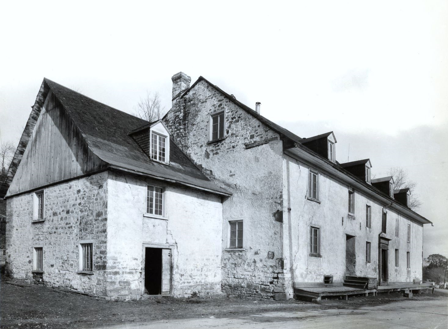 Moulin du Petit-Pre - Château-Richer, Quebec